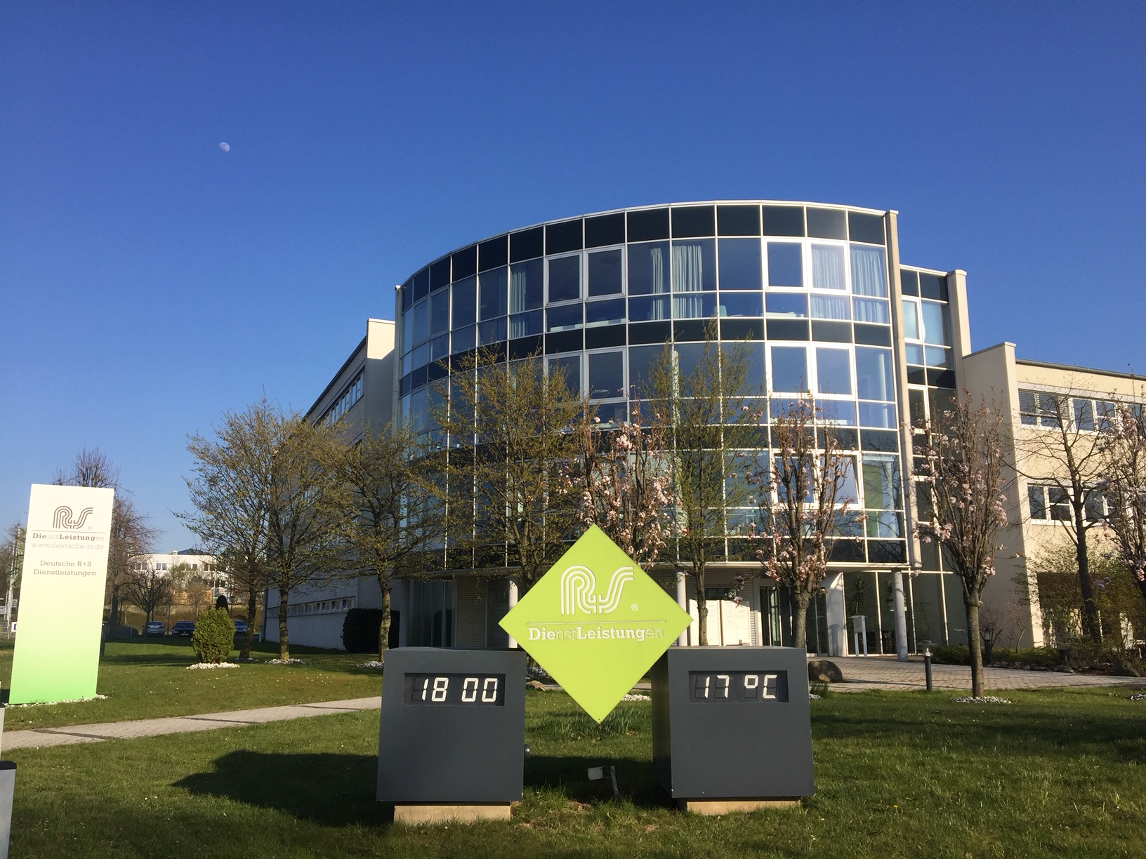 R+S Dienstleistungen, Unternehmen im Bereich Gebäudereinigung und Sicherheit, besteht seit 1912. Standort Hannover hier die Firmenzentrale unter der Adresse Weltausstellungsallee 19